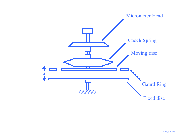 فولتمتر ذو القرص المنجذب